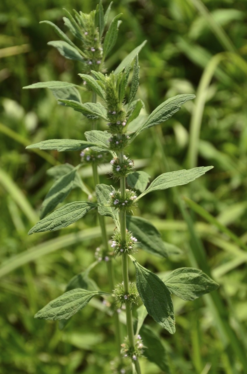 Leonurus marrubiastrum